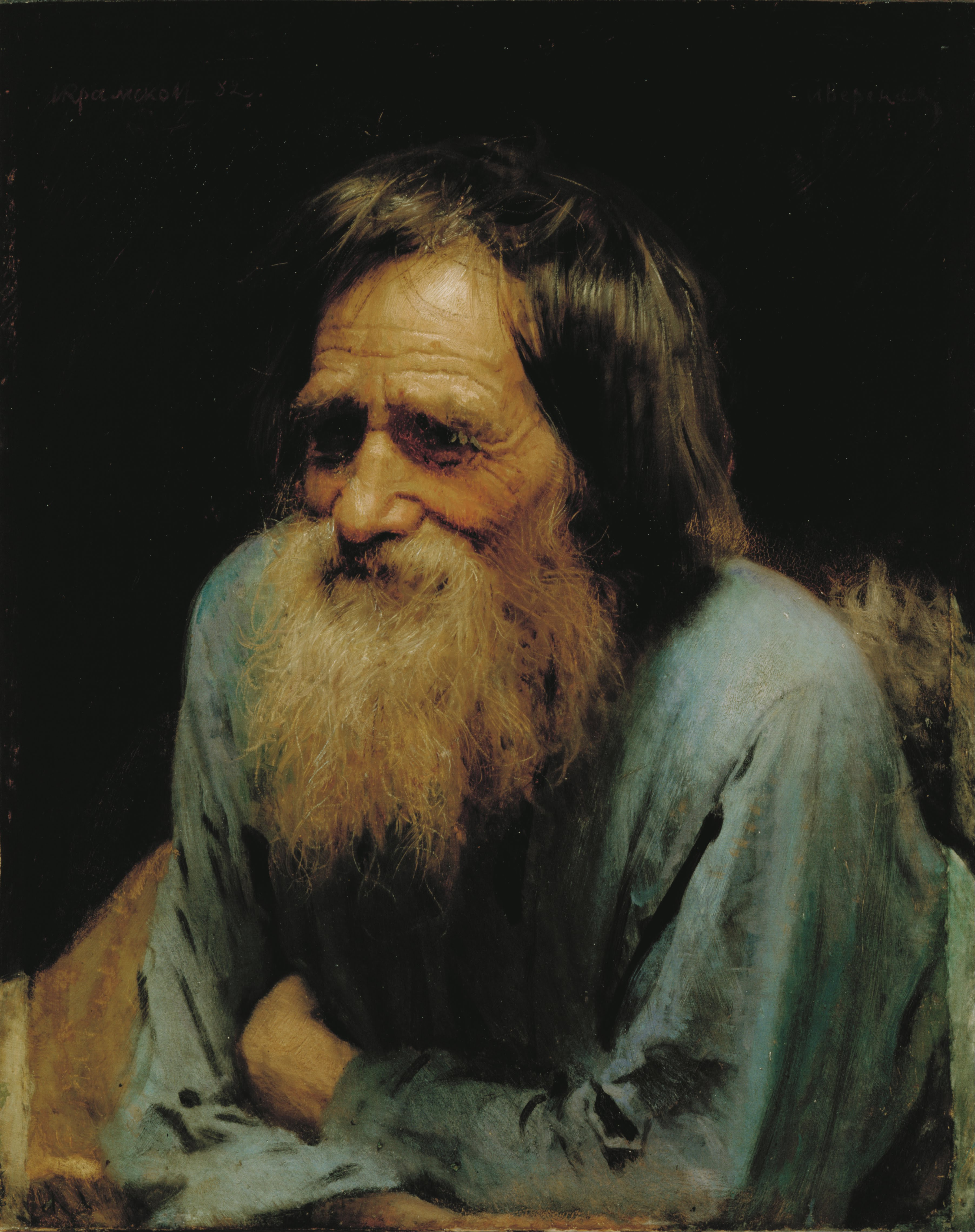 Создание собирательных образов людей из народа Крамской считал одной из важнейших задач современного искусства. «А народ-то что может дать! Боже мой, какой громадный родник!» — писал он И. Е. Ре- пину. В портрете Мины Моисеева ярко проявилось свойственное ху- дожнику умение концентрировать внимание на самом существенном. В облике крестьянина, в его свободной, непринужденной позе ощу- щаются внутреннее спокойствие и независимость. Изборожденное мор- щинами старческое лицо излучает тепло, доброту, свидетельствуя об умудренности и жизненном опыте.